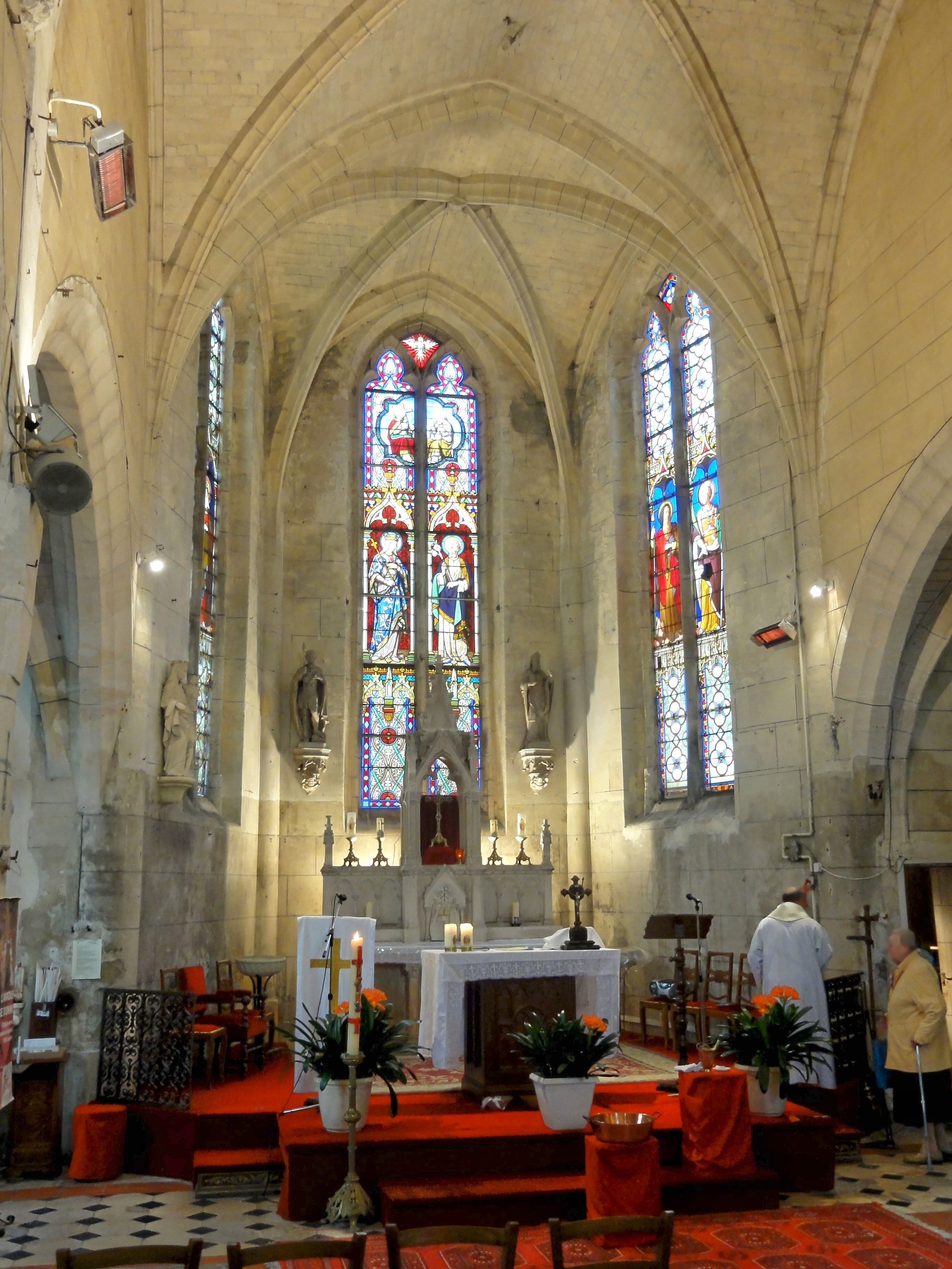 Abside.